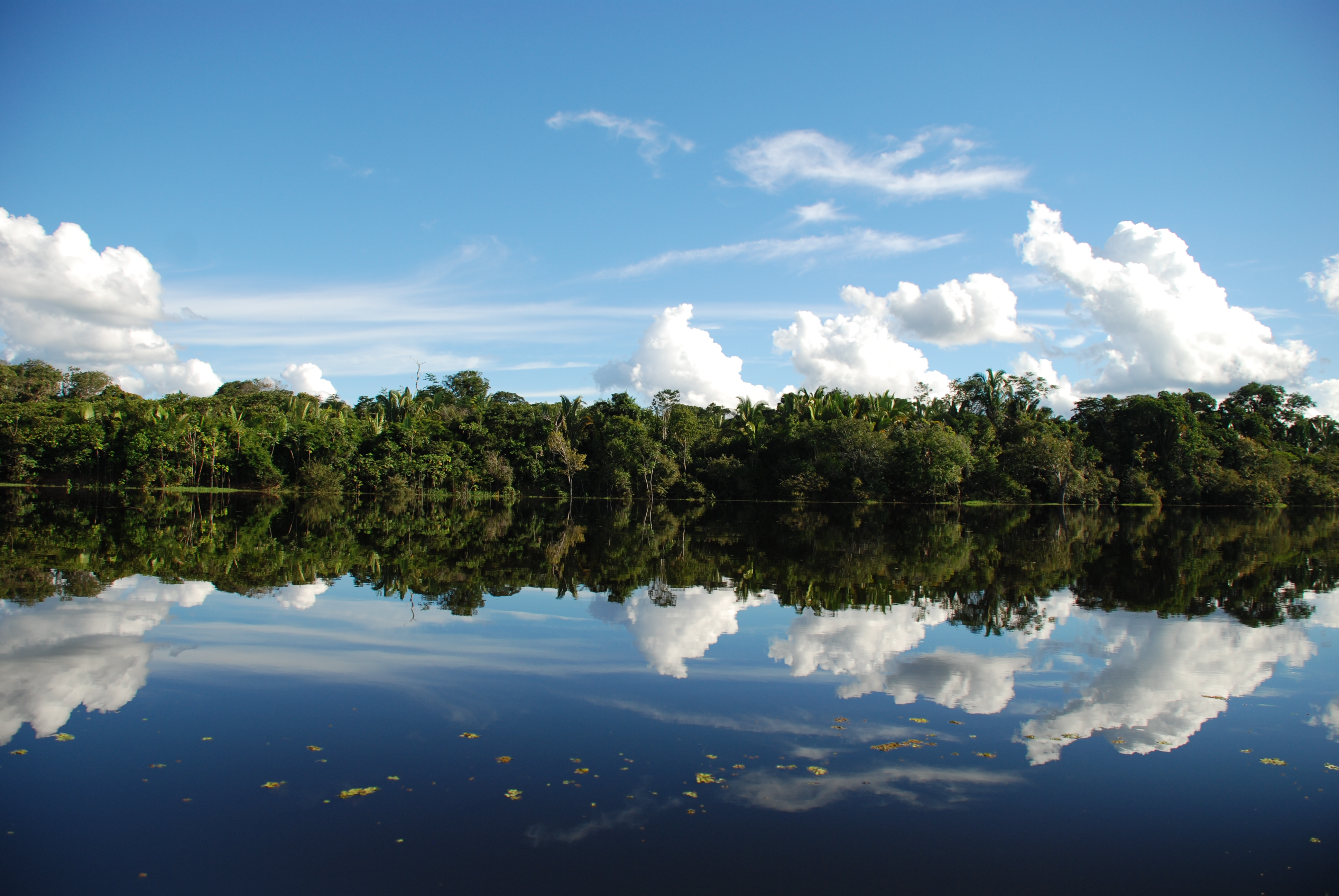 Reflexo no rio negro